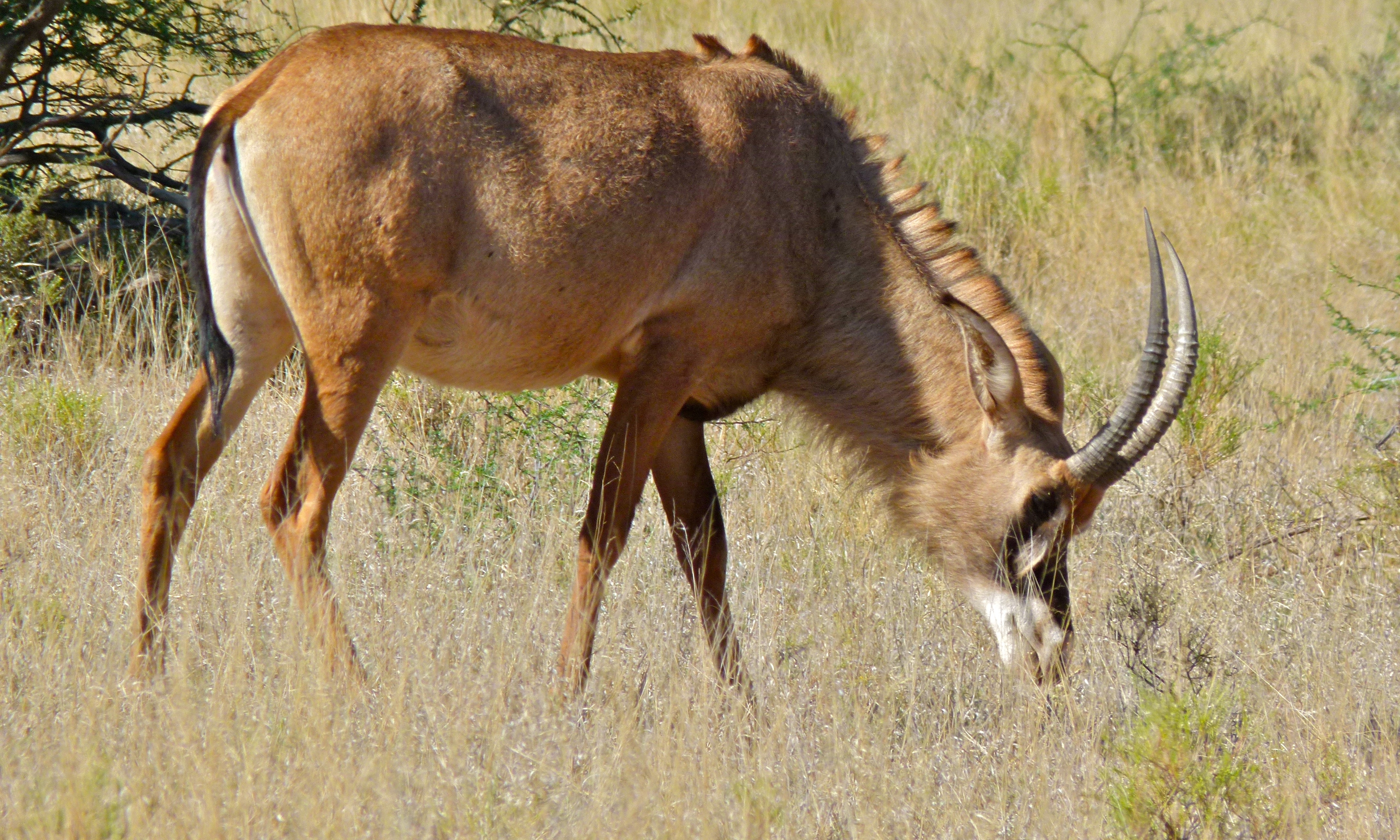 Mokala NP, SOUTH AFRICA